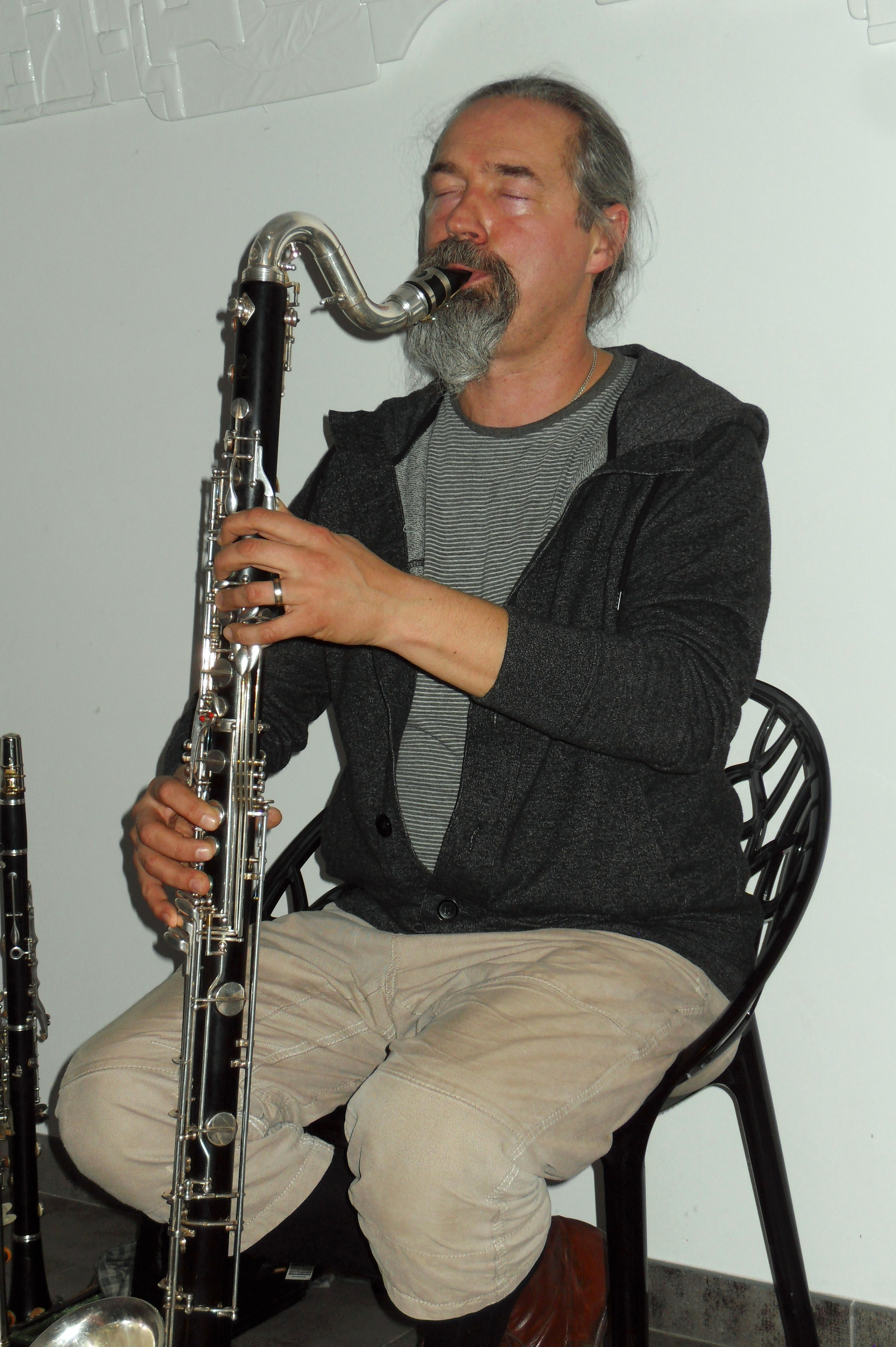 Jerzy Mazzoll, klarnecista, wokalista i kompozytor.